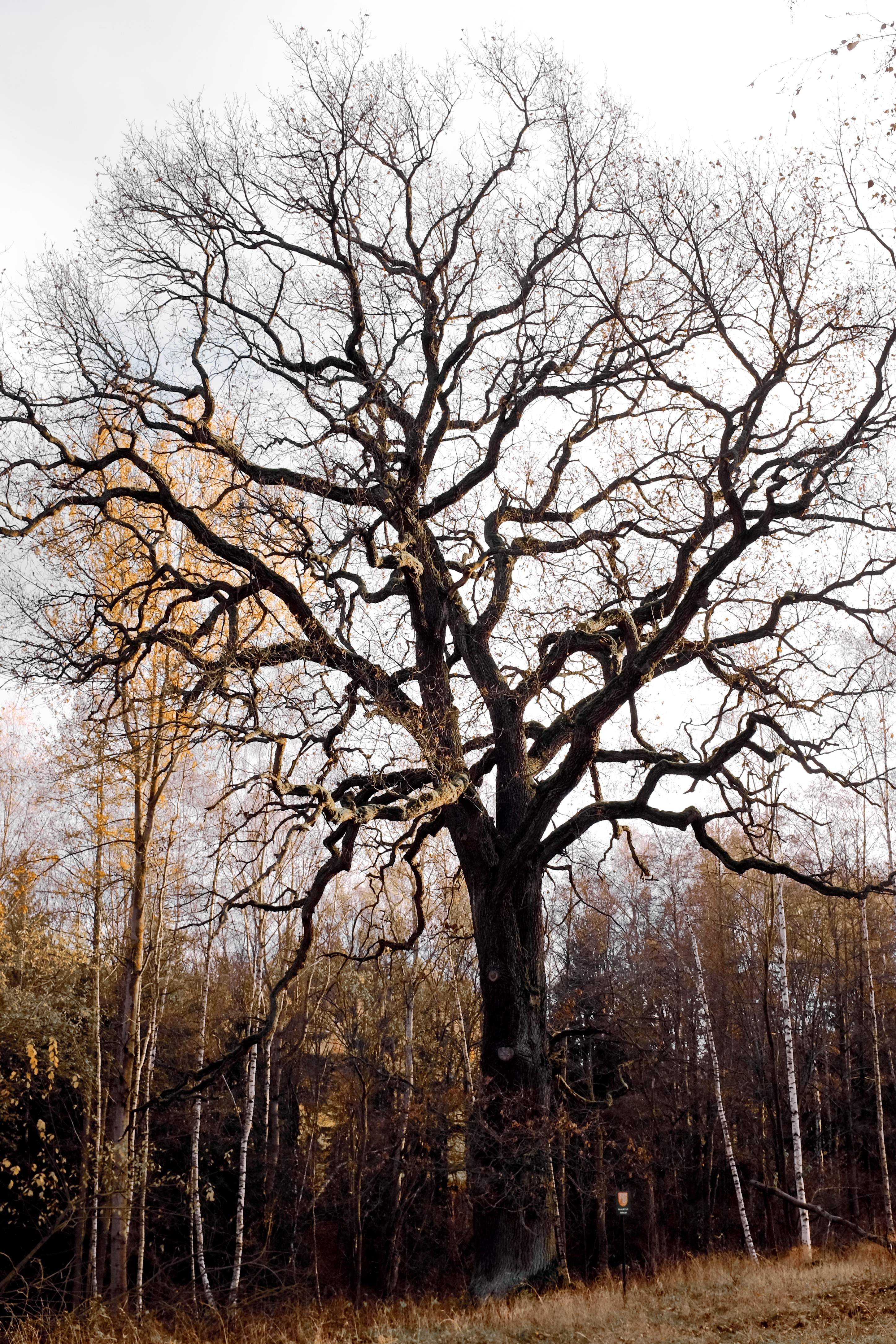 Památný strom Bambasův dub, Arnoltov, část města Březová, okres Sokolov